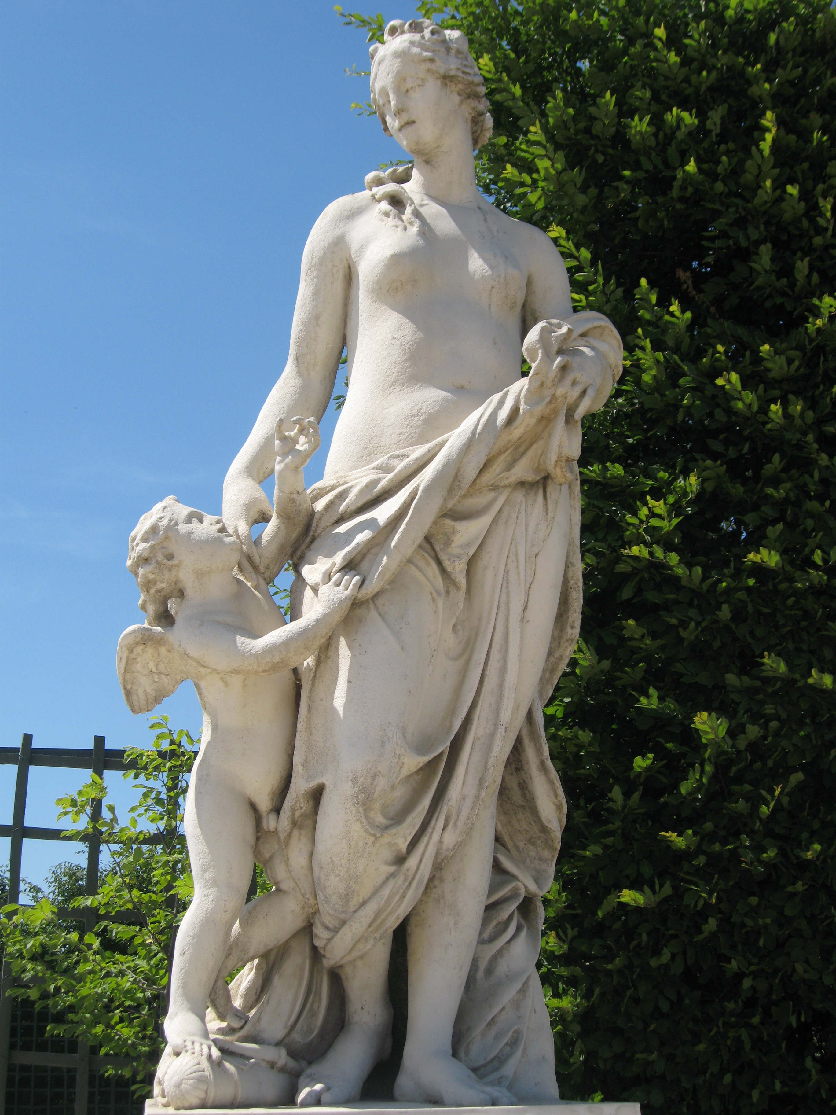 L'Heure de Midi par Marsy